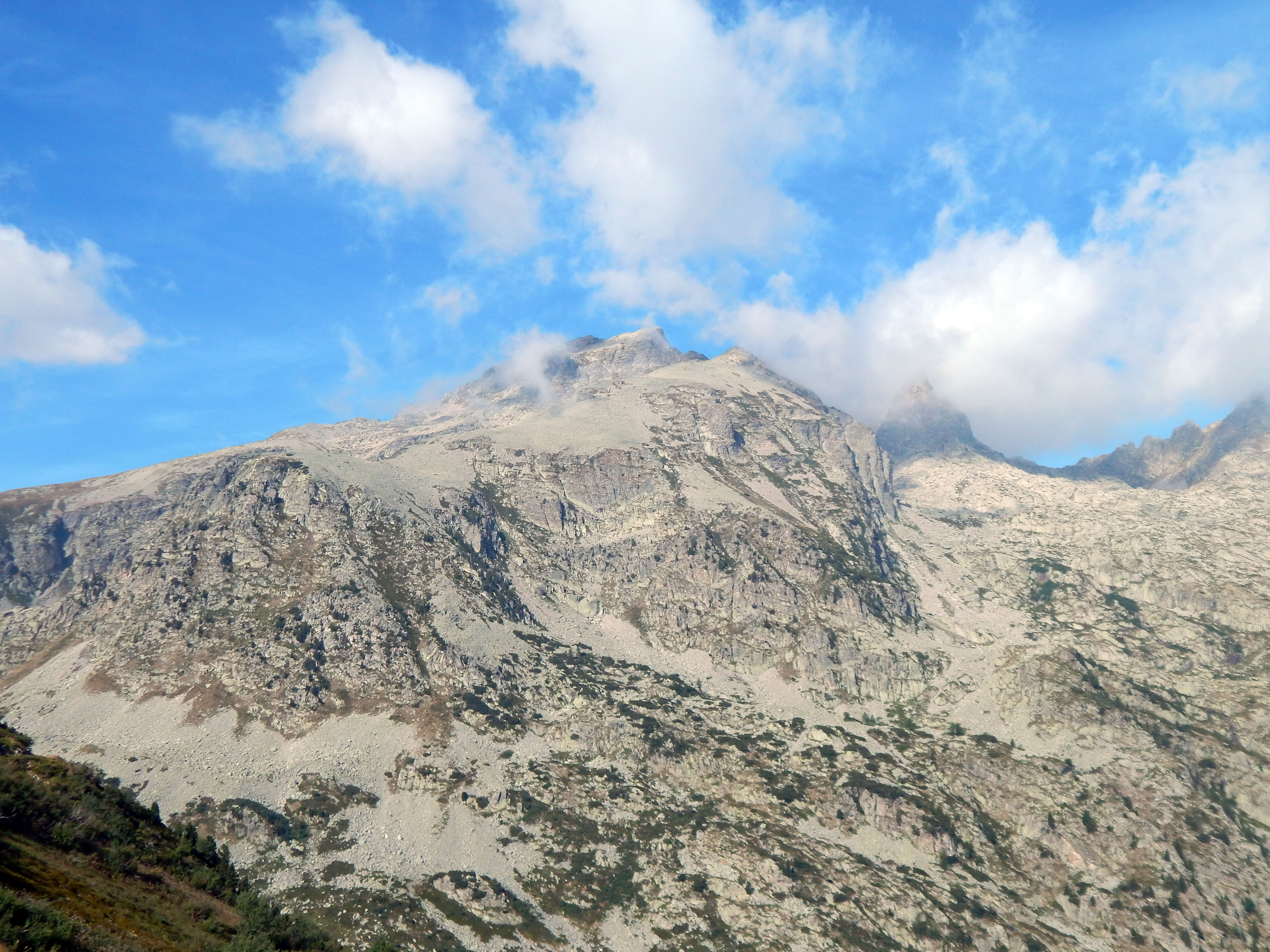 Rocca dell'Abisso vista dalla via normale del Colle di Tenda